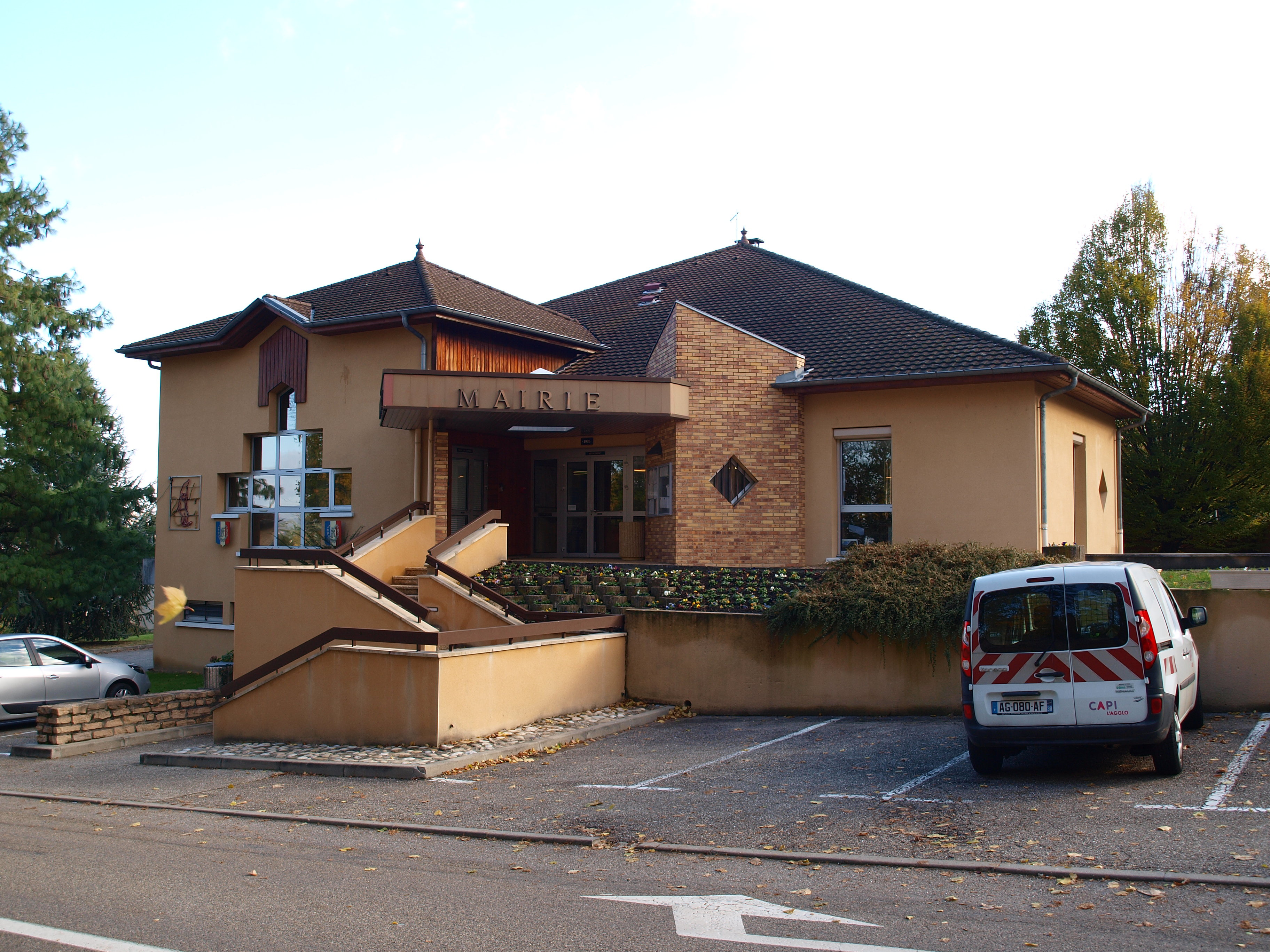 Domarin (Isère, France) ; mairie